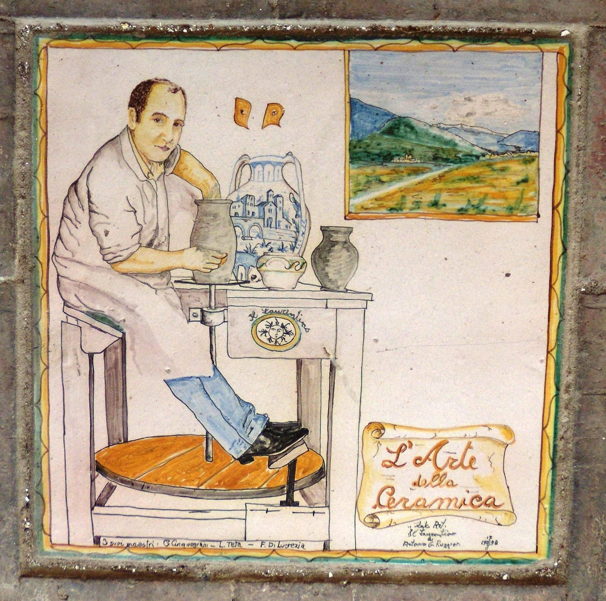 Pannello in ceramica cerretese raffigurante un ceramista al lavoro.